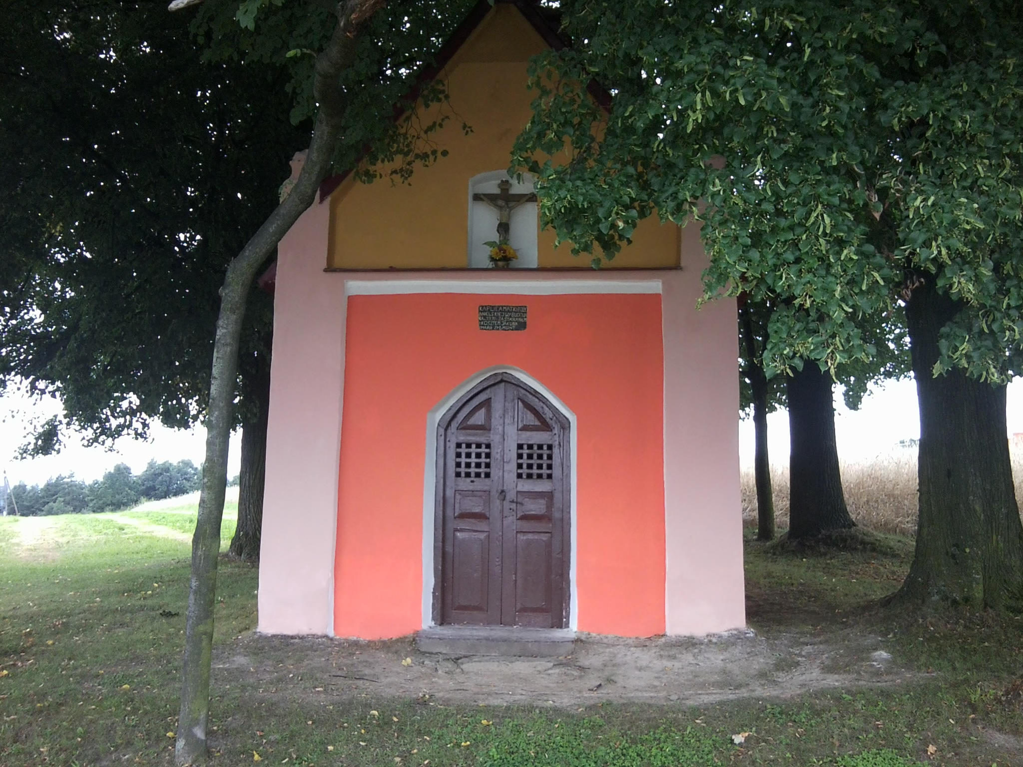 Kaplica Matki Bożej Anielskiej w Mokrej Wsi